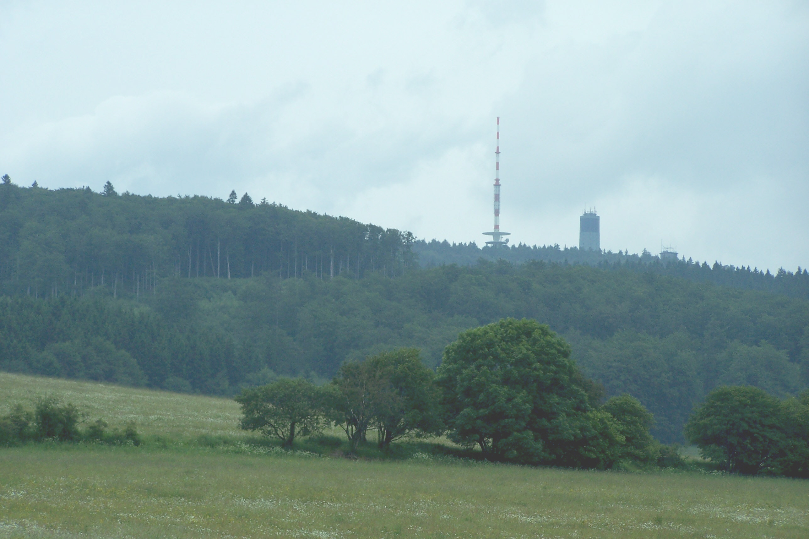 Brotterode, Wiesenpartie am Käsberg am Aufstieg zum Großen Inselsberg